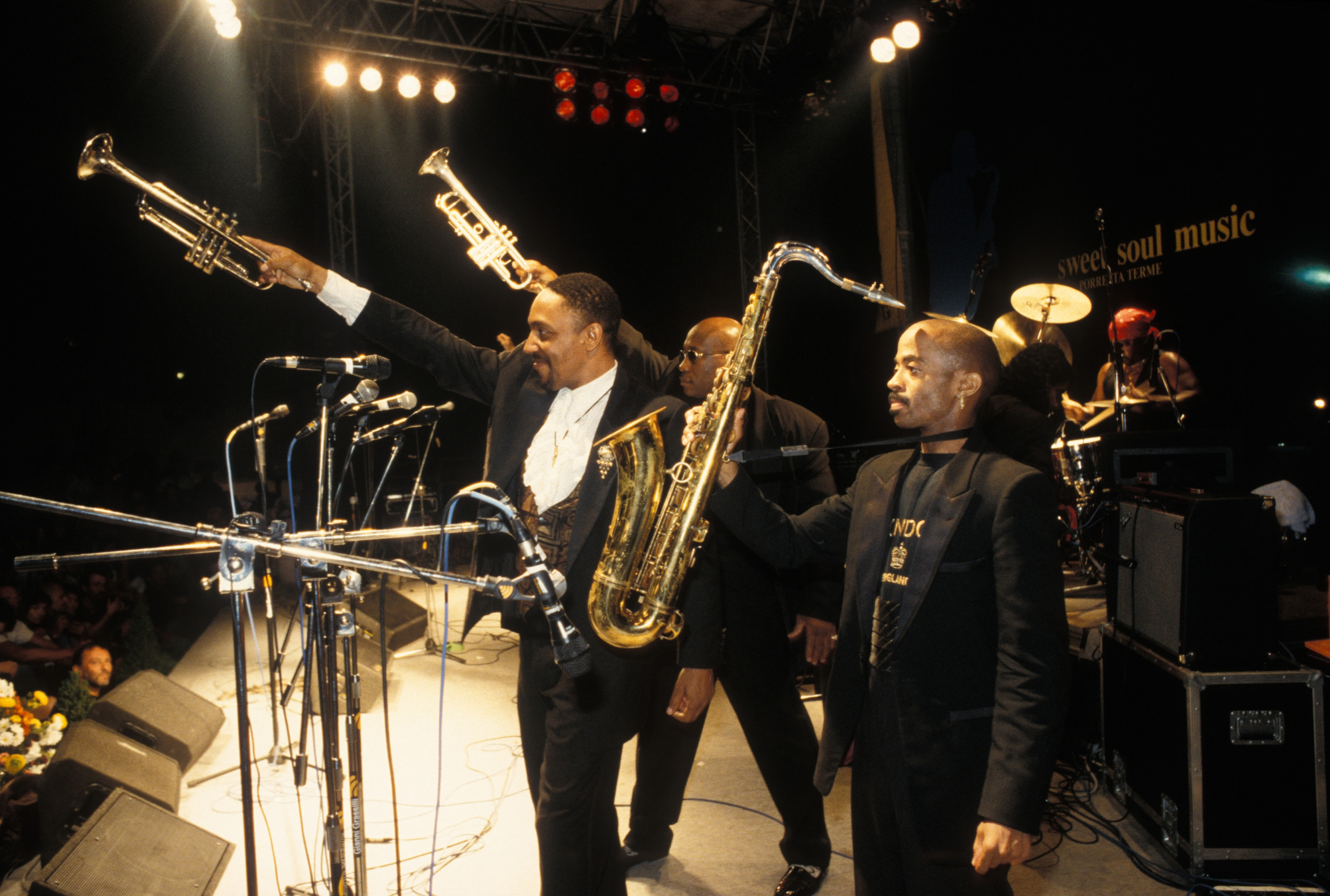 Porretta Soul Festivale, stage